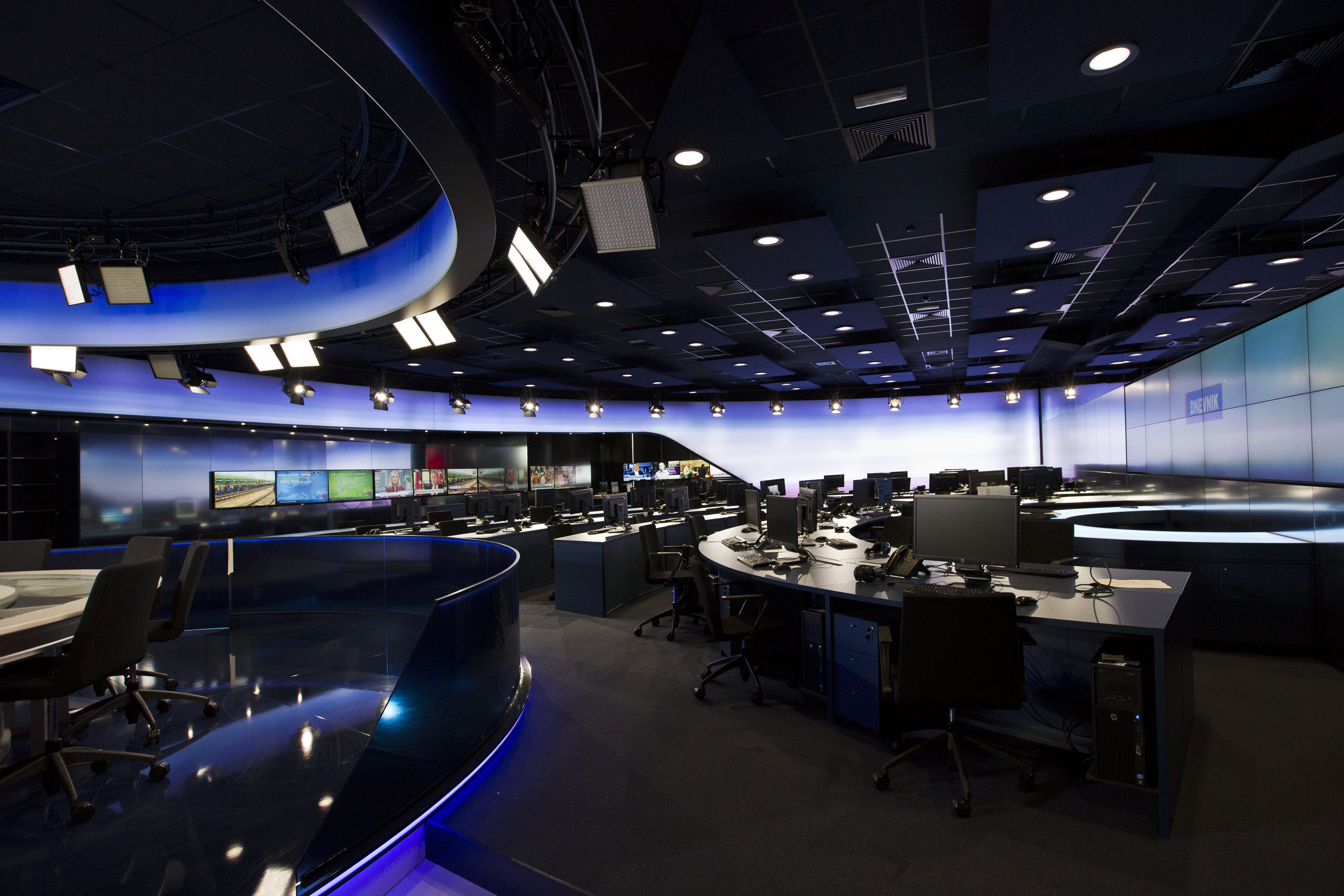 Studio Nove TV